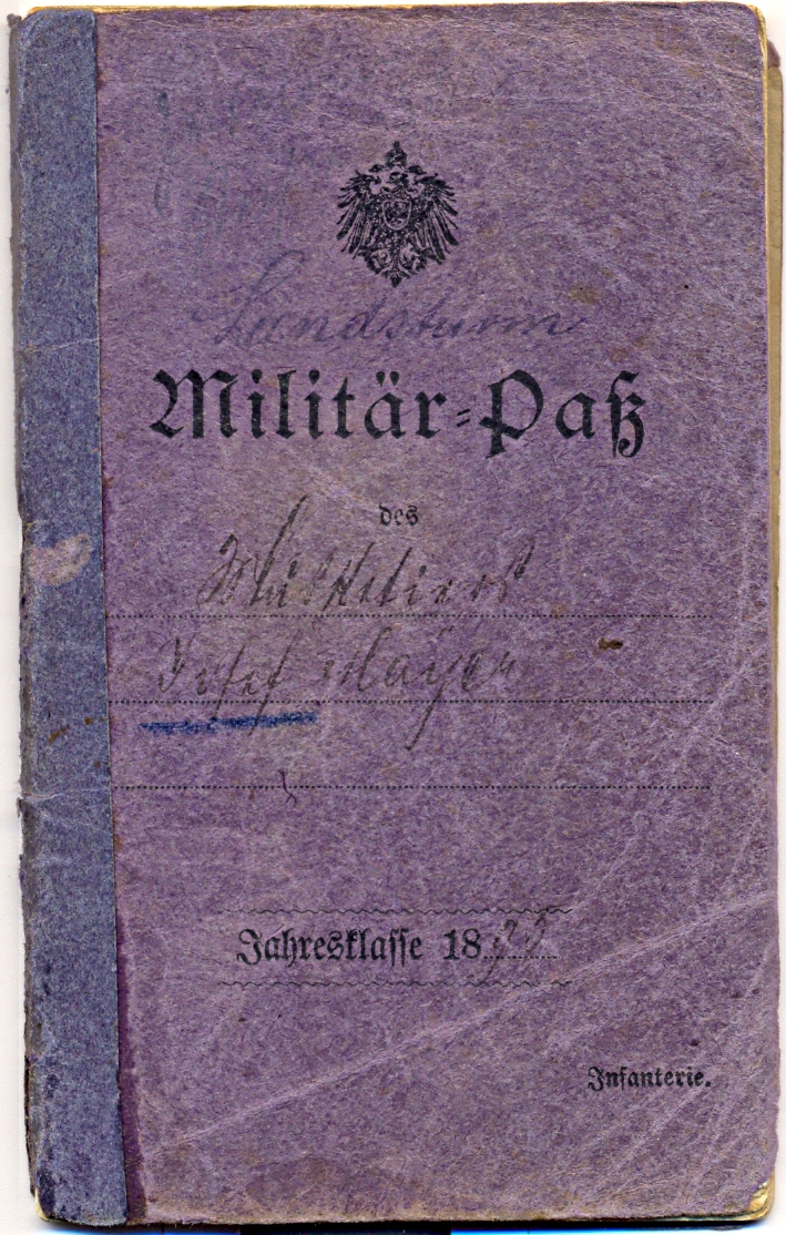 Titelseite eines Militärpasses 1895